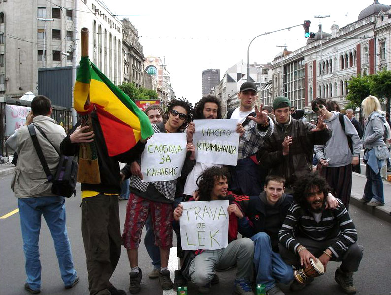 На слици су учесници првог ганџа марша у Београду 2005. године.